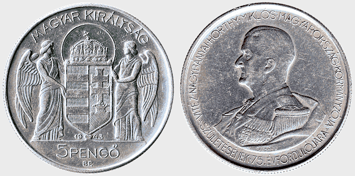 Портрет Міклоша Горті на монеті Угорщини 5 пенге 1943 року